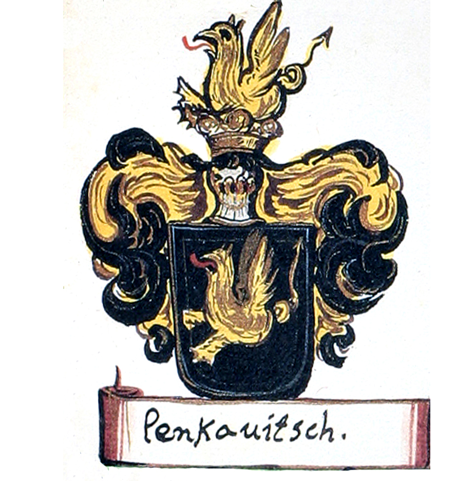 Grb Ivana Lenkoviča